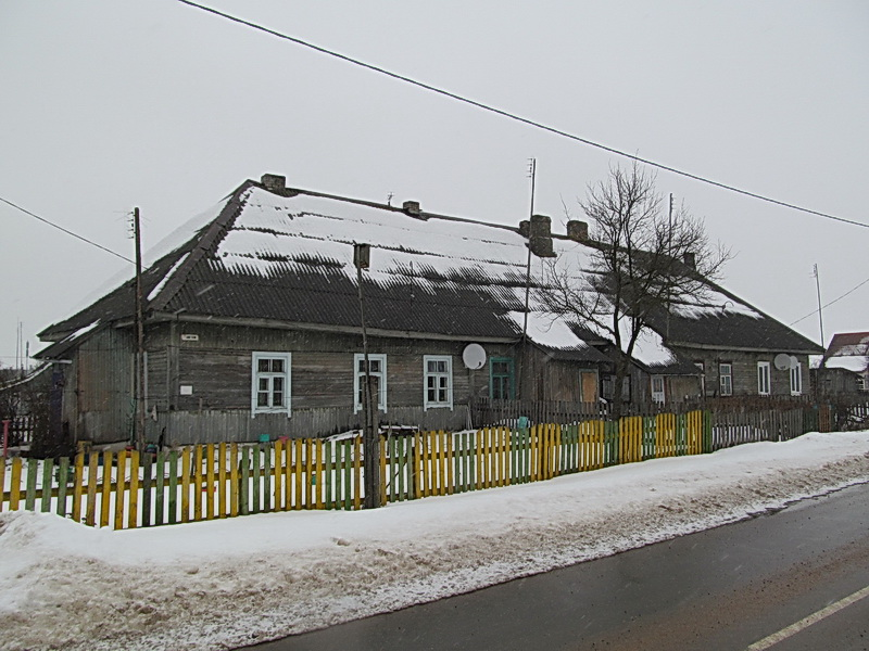 Юрацішкі. Драўляны дом